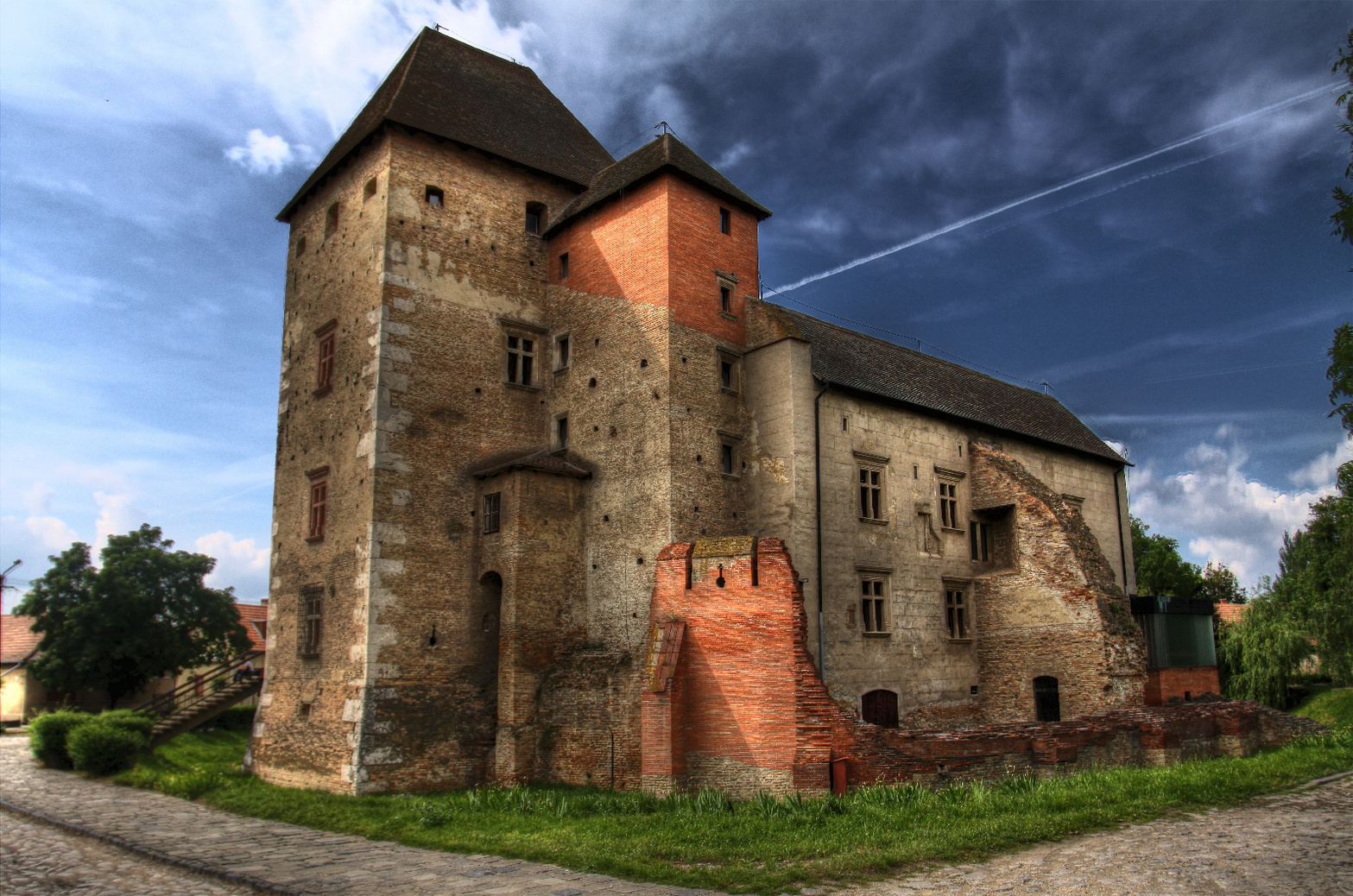 Vár (Simontornya, Vár tér) This is a photo of a monument in Hungary. Identifier: 8725